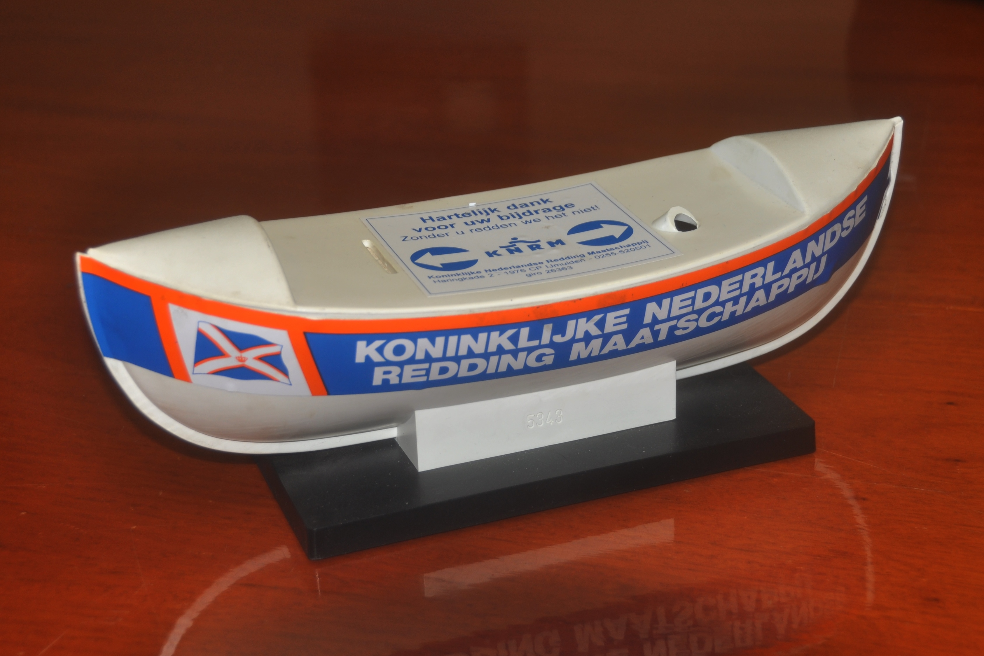 Bootje.